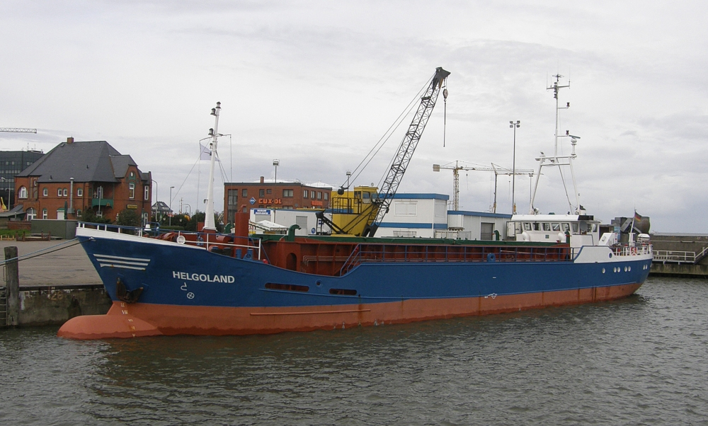 Das Schiff Helgoland in Hafen von Cuxhaven IMO Number: 6417657 MMSI Number: 211286500 Callsign: DNFD Length: 46 m Beam: 8 m